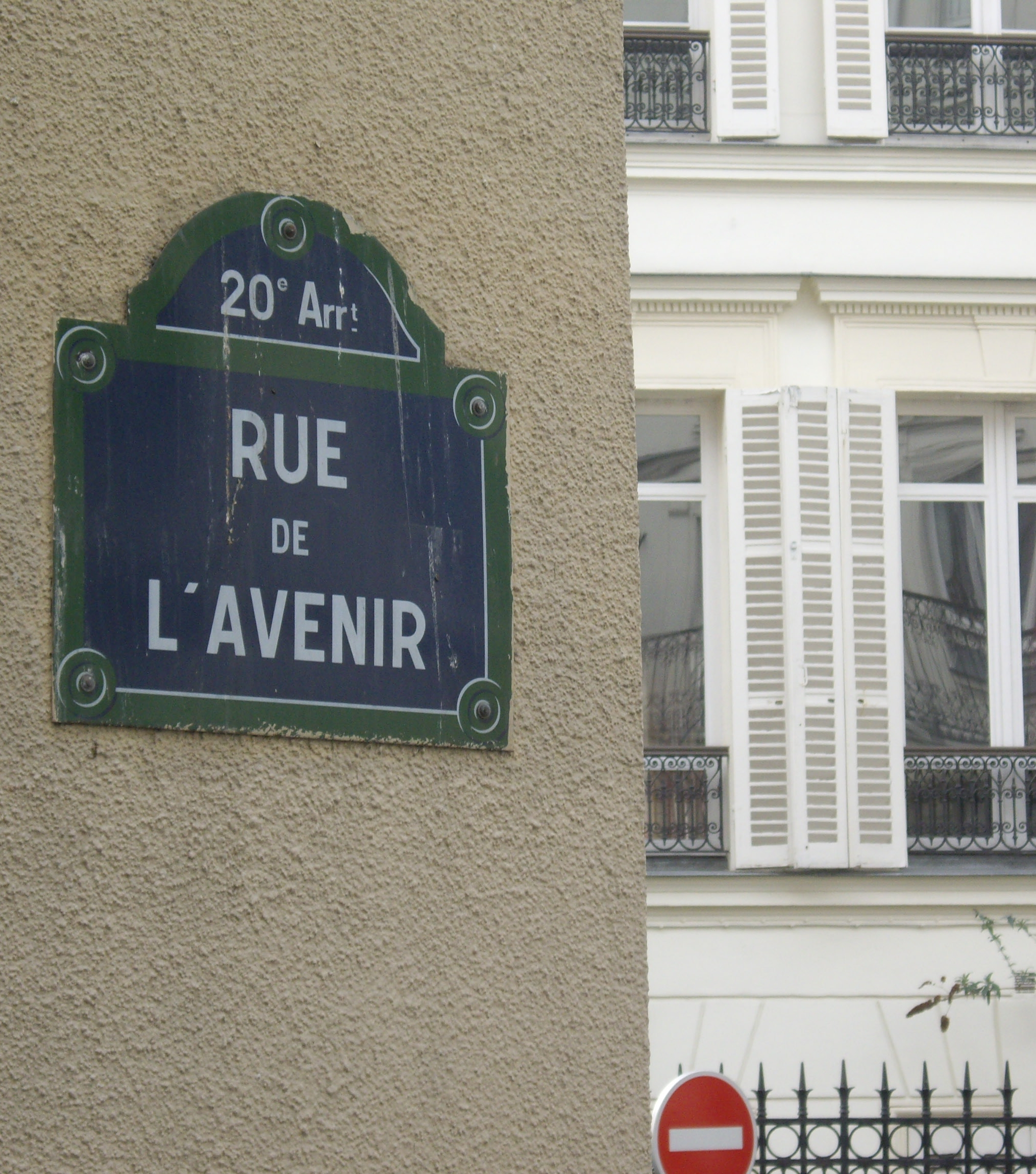 Rue de l'Avenir, Paris 20e